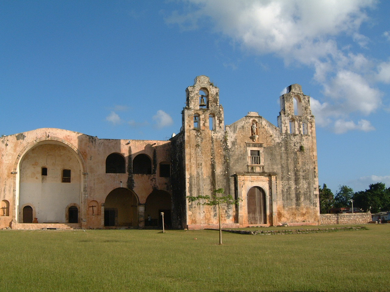 Church in Maní Yucatán Mexico